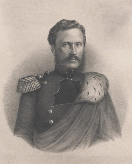 Portret - Litografie Alexandru Ioan Cuza